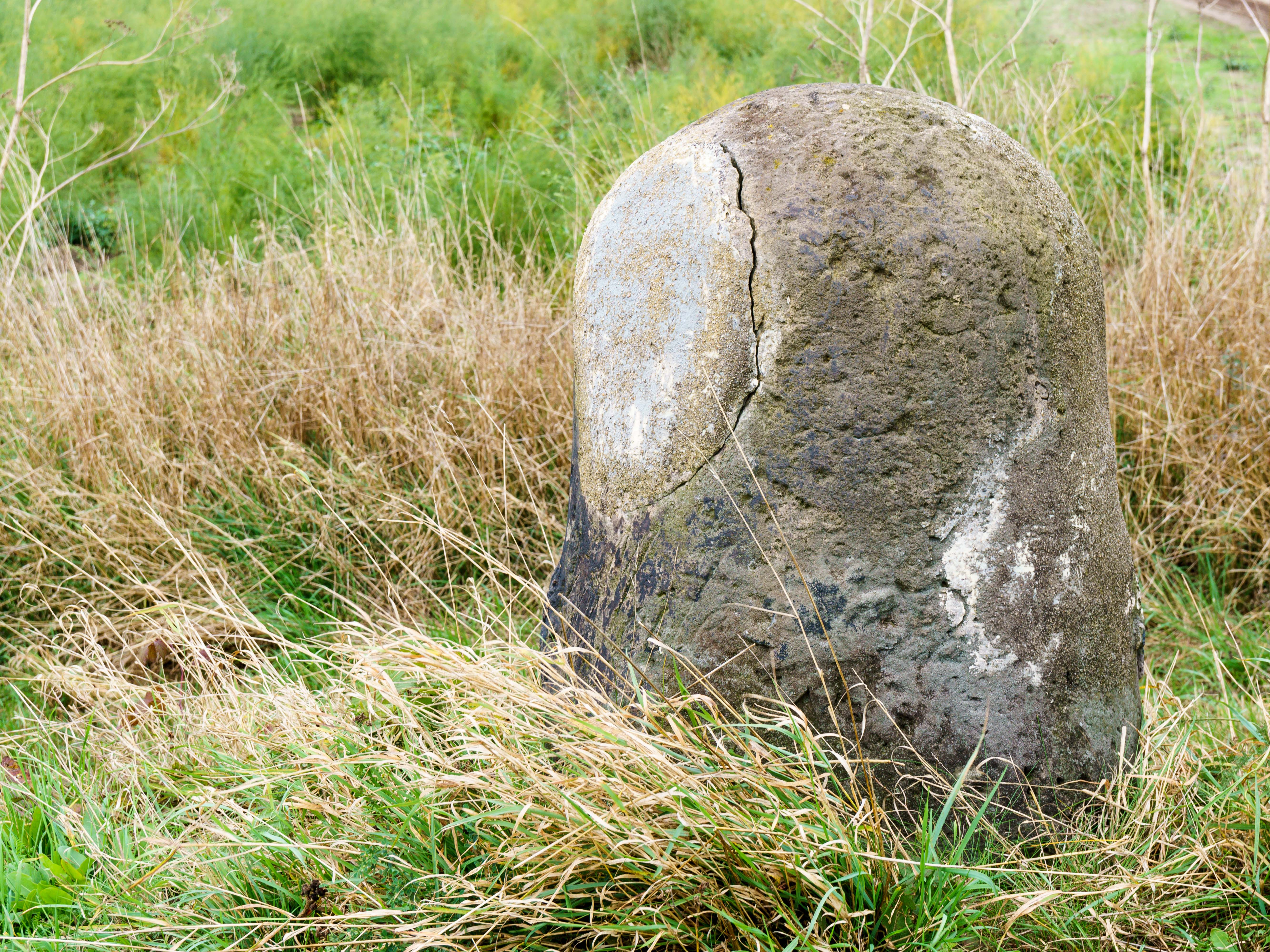 Preußischer Halbmeilenstein (0106) an der B 1 südwestlich von Hohenseeden. Inschrift: 1/2 Meile